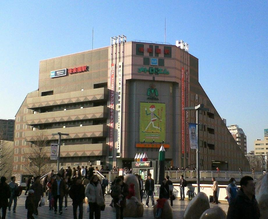 後楽園駅・メトロエム（2006年3月7日撮影、撮影者本人）